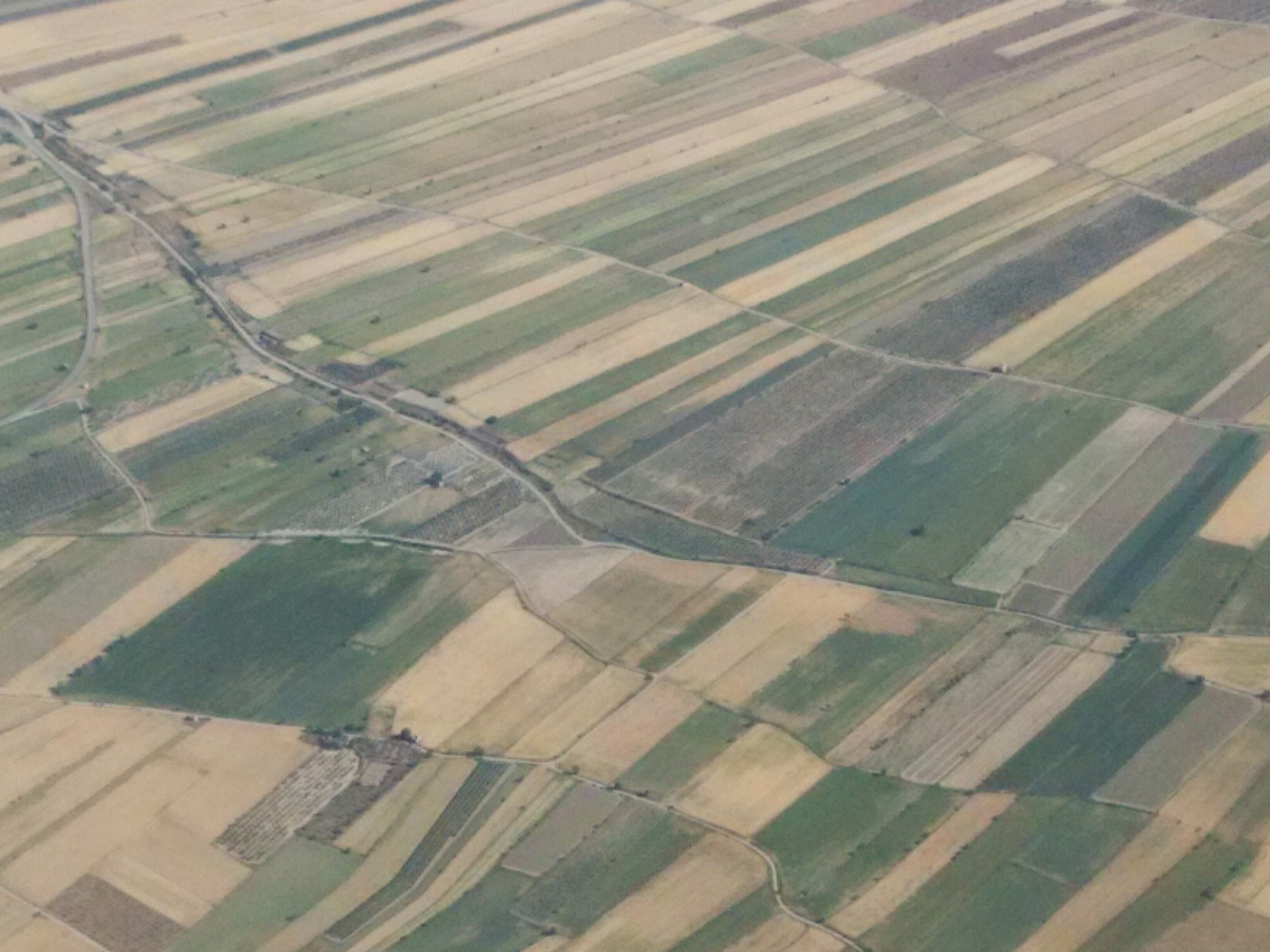 Desaparició del riu Corb aprop de Belianes